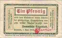 Notgeld des Verlags Gesellius in Demmin